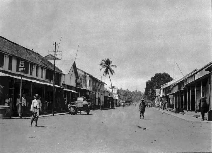 Foto. Den Passar, straatbeeld.